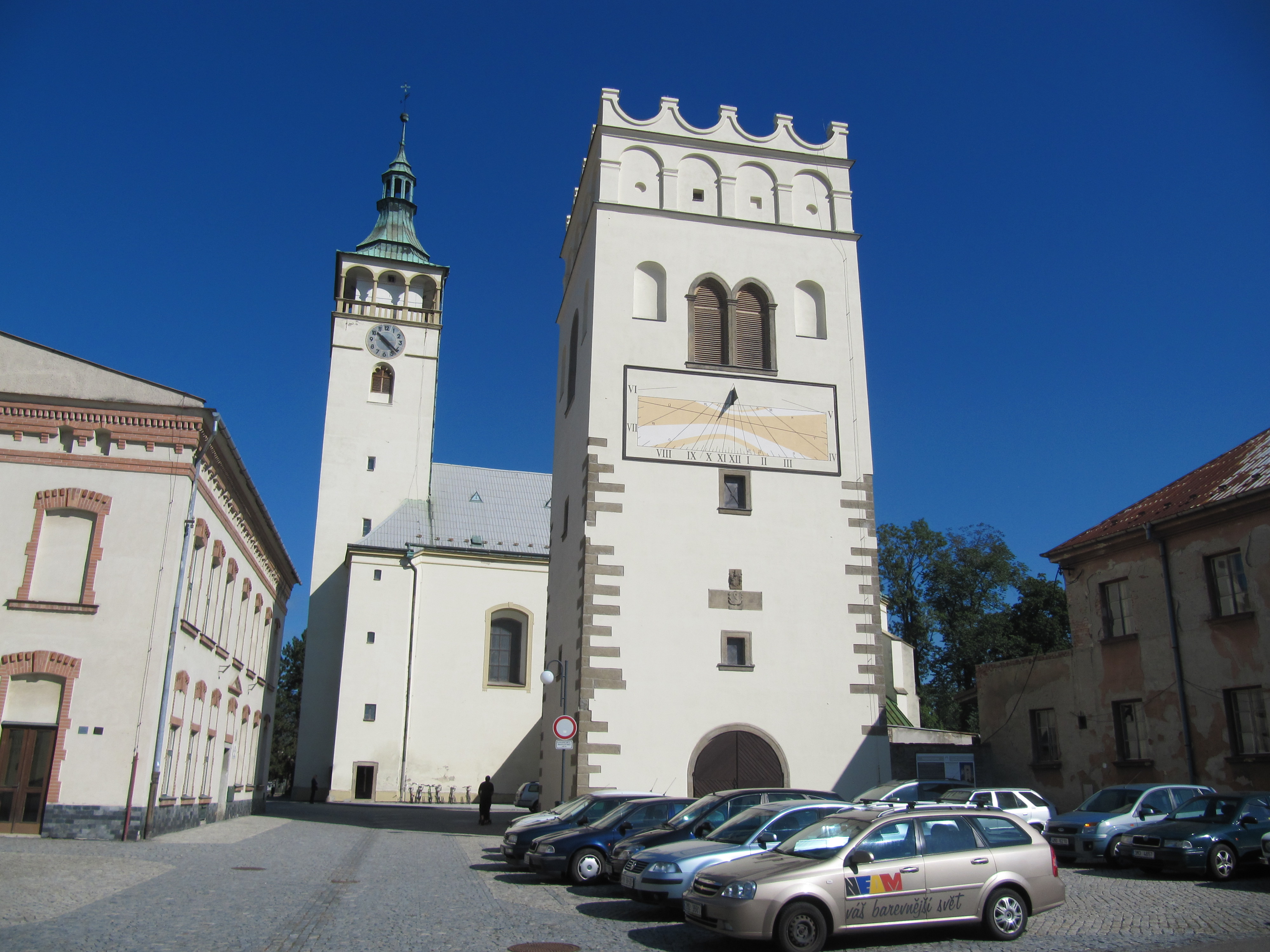 Kostel sv. Jakuba Většího (Lipník nad Bečvou), Křížkovského, Lipník nad Bečvou